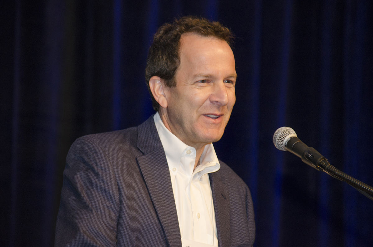 Steven Salzberg at ISMB 2018